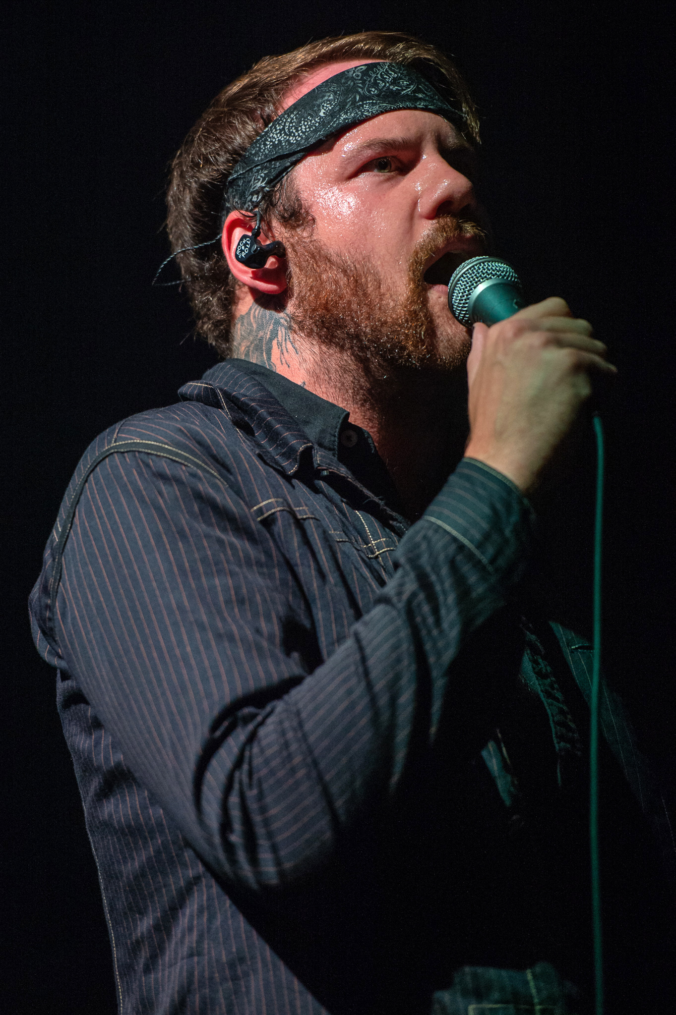 ARGO-Konzerte,Alternarena,Arena Nürnberger Versicherung,Beartooth,Caleb Shomo,Konzert,Livekonzert,Livemusik,Musik,RiP,Rock im Park 2019